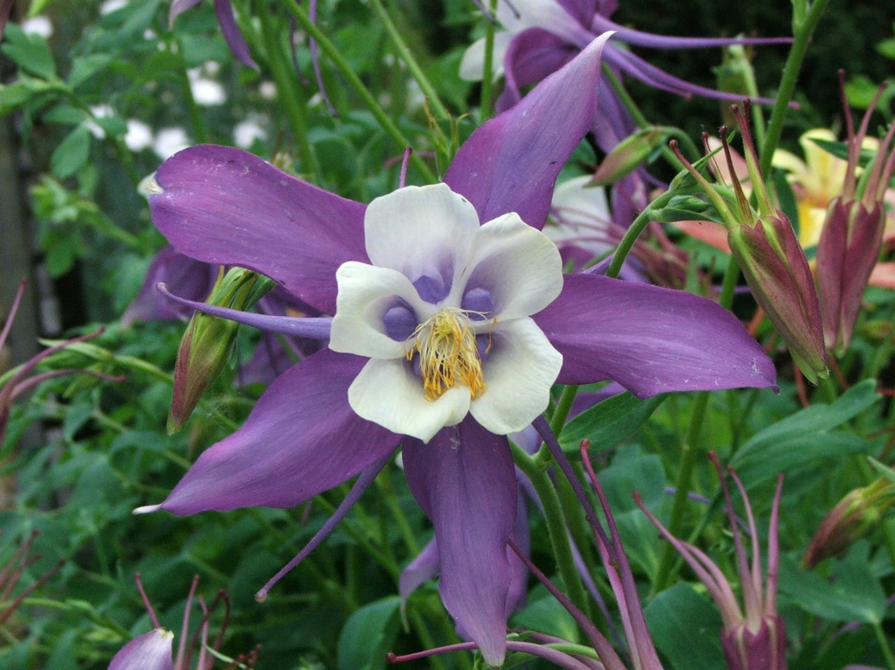 Aquilegia x hybrida (pl. ostróżka ogrodowa)